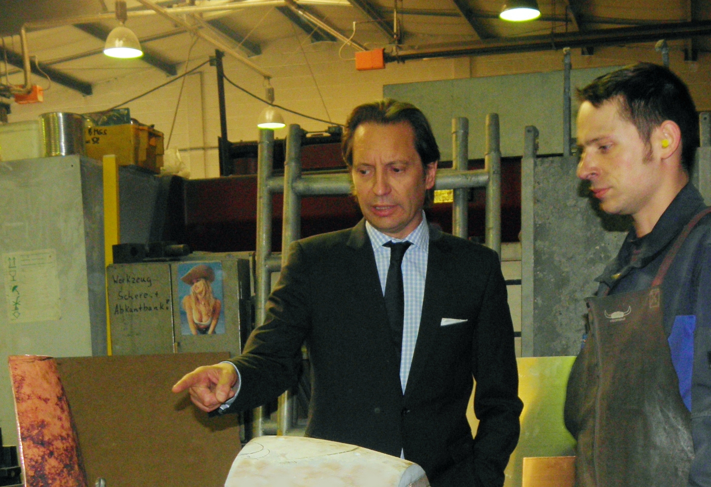 Stefan Fittkau in seiner Werkstatt anl. des Tags der offenen Tür